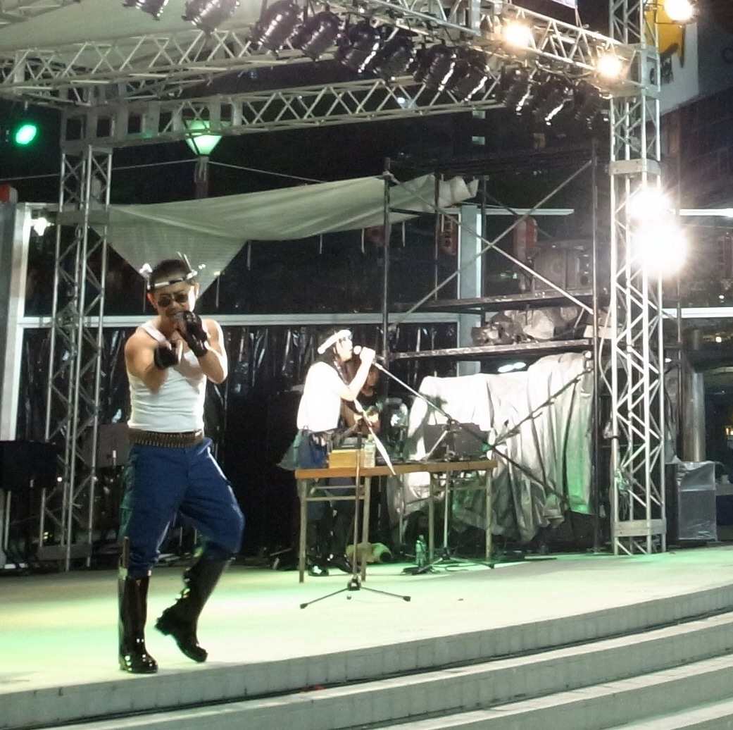 漁港（ぎょこう、Gyoko） 新浦安祭りにて